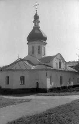 Новгород-Сіверський_—_Петропавлівська_церква.jpg: Новгород-Сіверський (райцентр Чернігівської області). Спаський монастир. Петропавлівська церква. Вигляд з північного сходу.